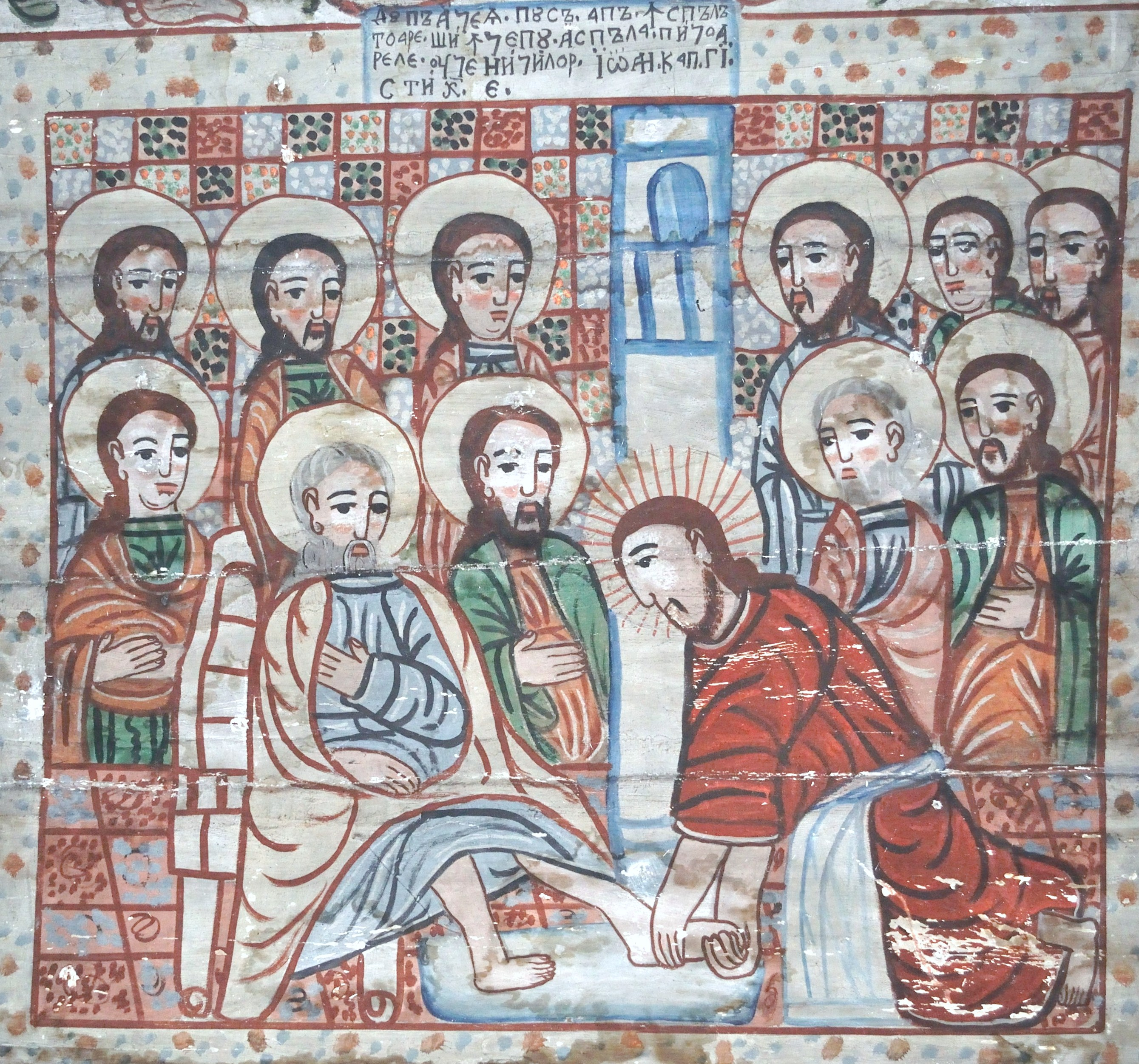 Biserica de lemn din Agârbiciu, județul Cluj